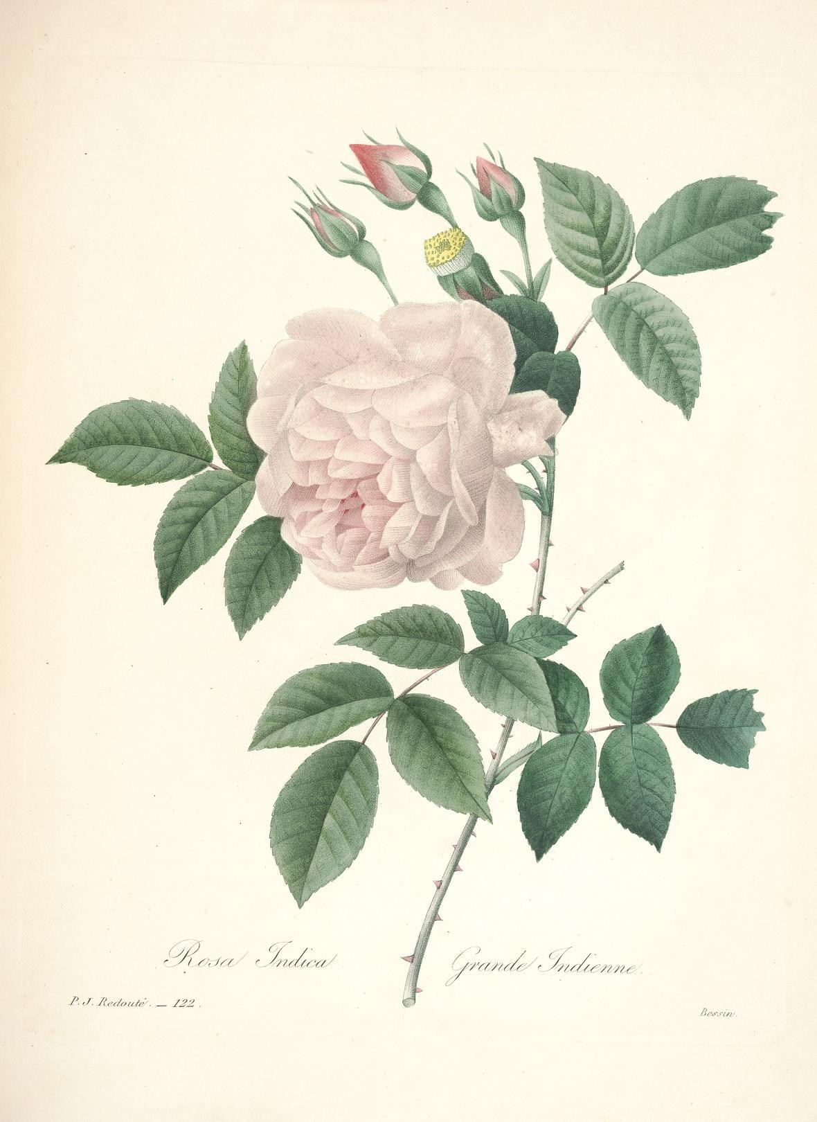 ^ - ^ Mjzclozùée/ . 122 6ca/ Bars in/.